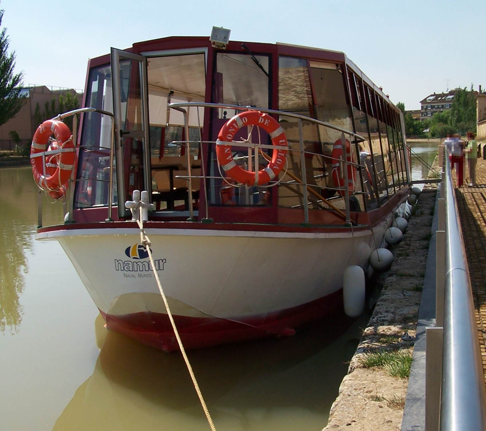 Es una foto del barco Antonio de Ulloa, que recibe el nombre del ingeniero que diseñó el Canal de Castilla. Este barco es eléctrico y realiza un paseo por el canal, algunos dias los hace más largos con lo que conviene informarse, si interesa. Foto bajo licencia creative commons, la puedes copiar, modificar y distribuir, siempre que indiques el origen y reconozcas la licencia de la foto. La foto la hice yo con mi cámara de fotos digital.